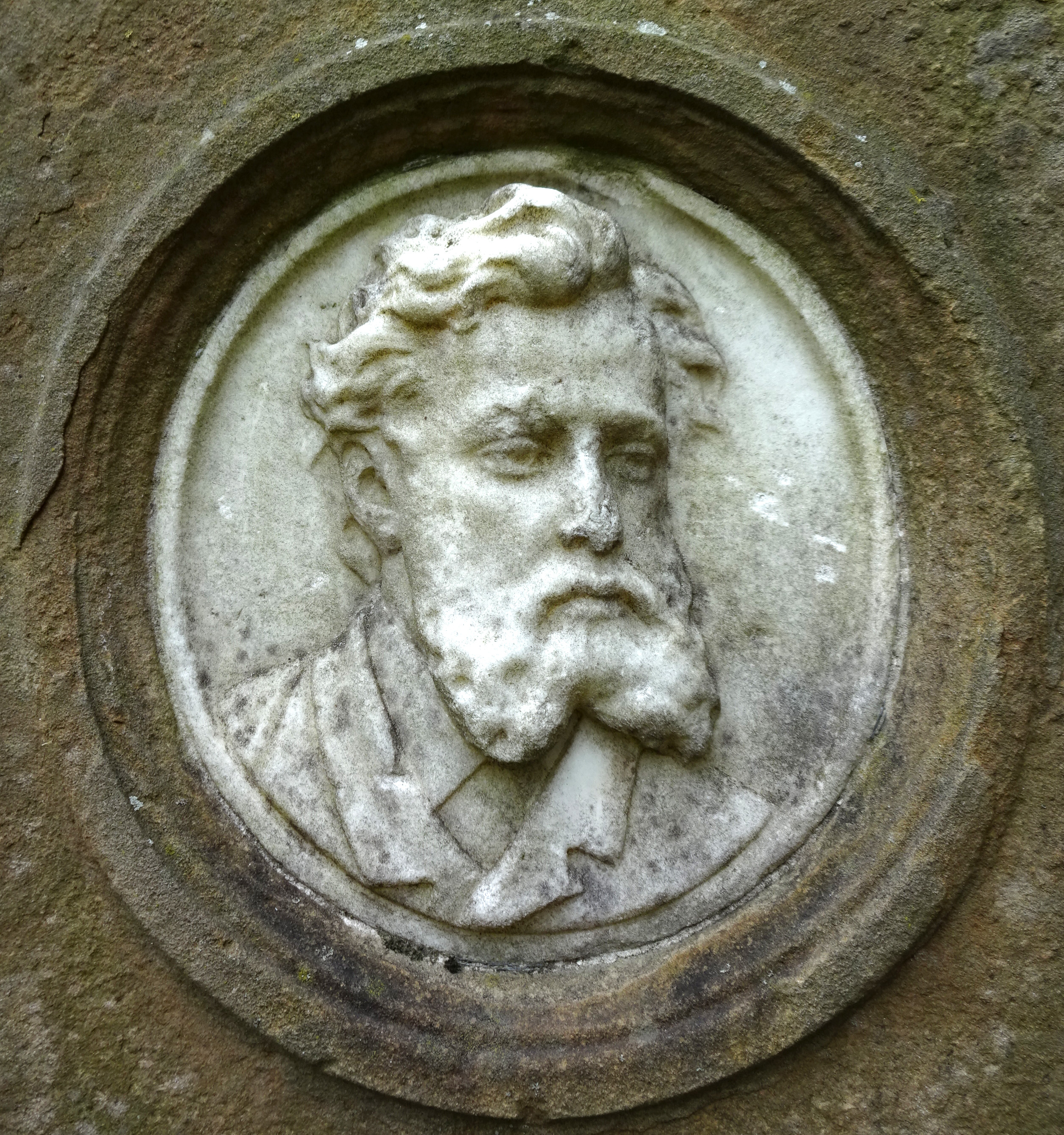 Porträtrelief Marmor Alexander Meinardus, Bildhauer (* 23. Juli 1843; † 23. Juni 1891) am Grabmal, Golzheimer Friedhof, nördlicher Teil